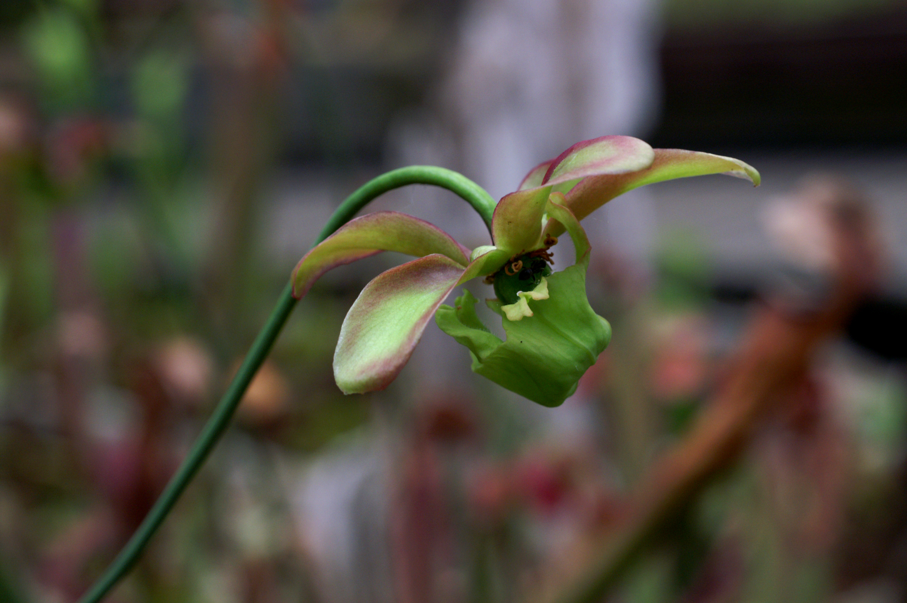 Sarracenia-minor Blüte 0142 a